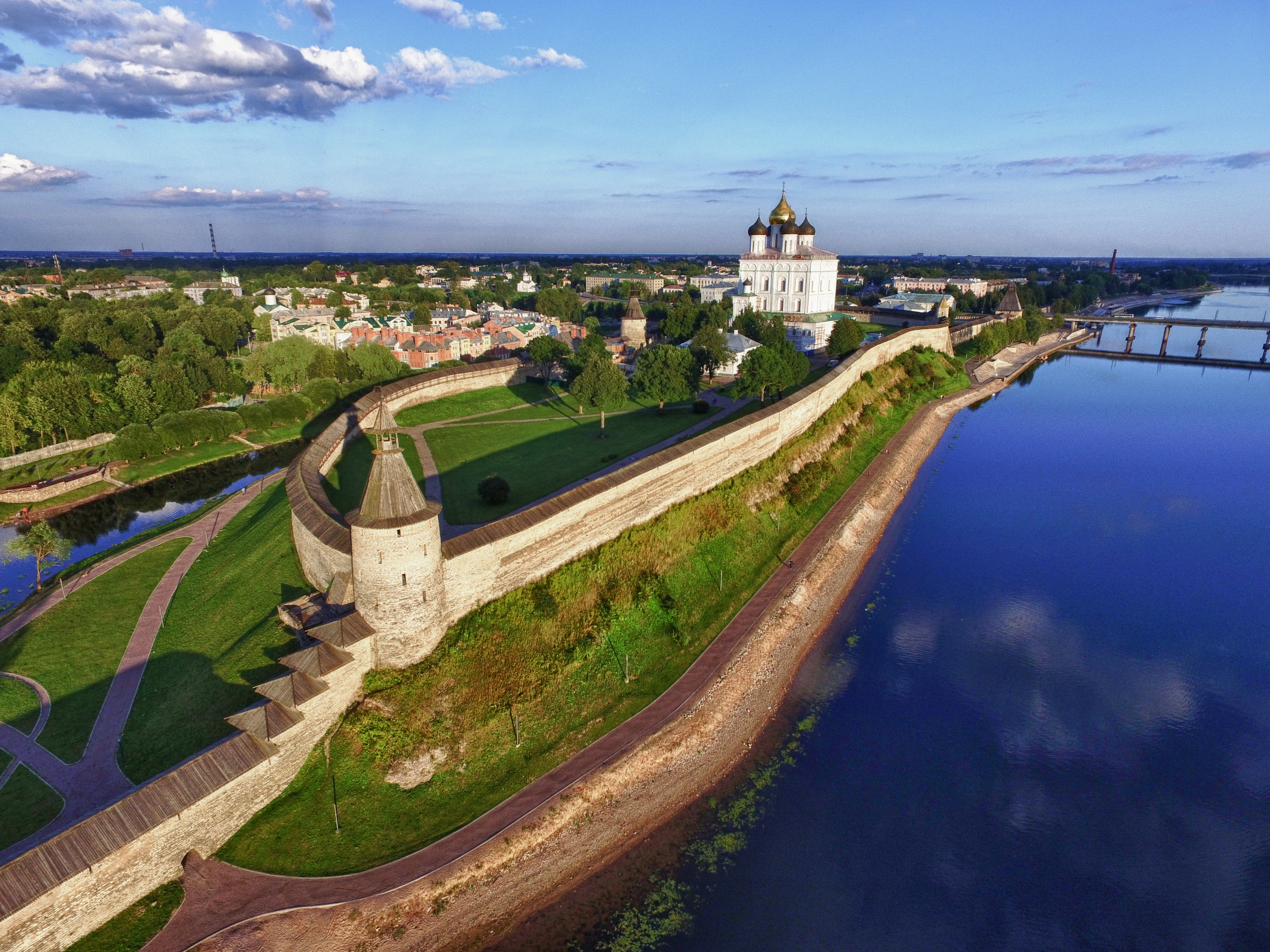 Ансамбль Псковского кремля: Кремль, у впадения р.Псковы в р.Великую, Псков, Псковская область